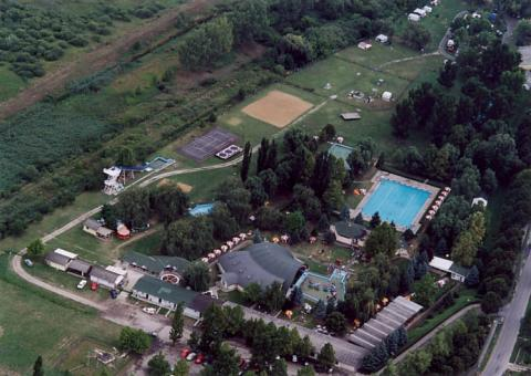 Tamási, Hungary, aerialphotography